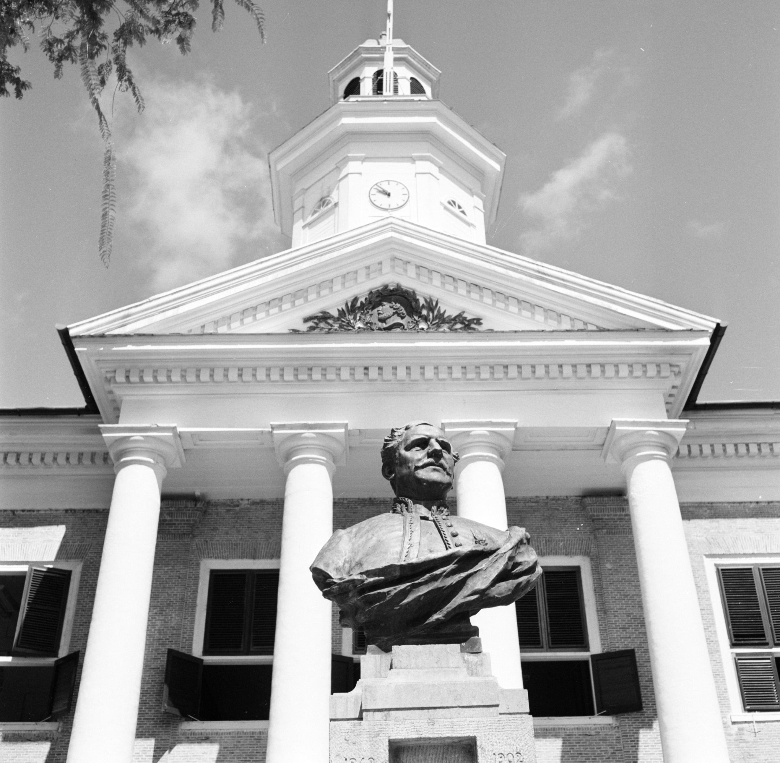 Collectie / Archief : Fotocollectie Van de Poll Reportage / Serie : Nederlandse Antillen en Suriname ten tijde van het koninklijk bezoek van koningin Juliana en prins Bernhard in 1955 Beschrijving : Standbeeld van gouverneur Van Asch van Wijck voor het Departement van Financiën aan het Gouvernementsplein Annotatie : Jhr. T.A.J. van Asch van Wijck was van 1891 tot 1896 gouverneur van Suriname Datum : 1 oktober 1955 Locatie : Paramaribo, Suriname Trefwoorden : gebouwen, standbeelden Persoonsnaam : Asch van Wijk, T.A.J. van Fotograaf : Poll, Willem van de Auteursrechthebbende : Nationaal Archief Materiaalsoort : Negatief (zwart/wit) Nummer archiefinventaris : bekijk toegang 2.24.14.02 Bestanddeelnummer : 252-2164